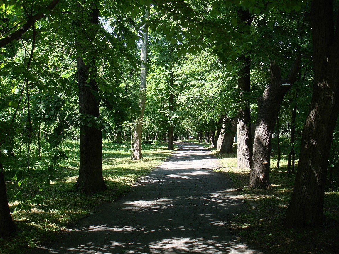 Alee în parcul Palatului știrbei din Buftea 03